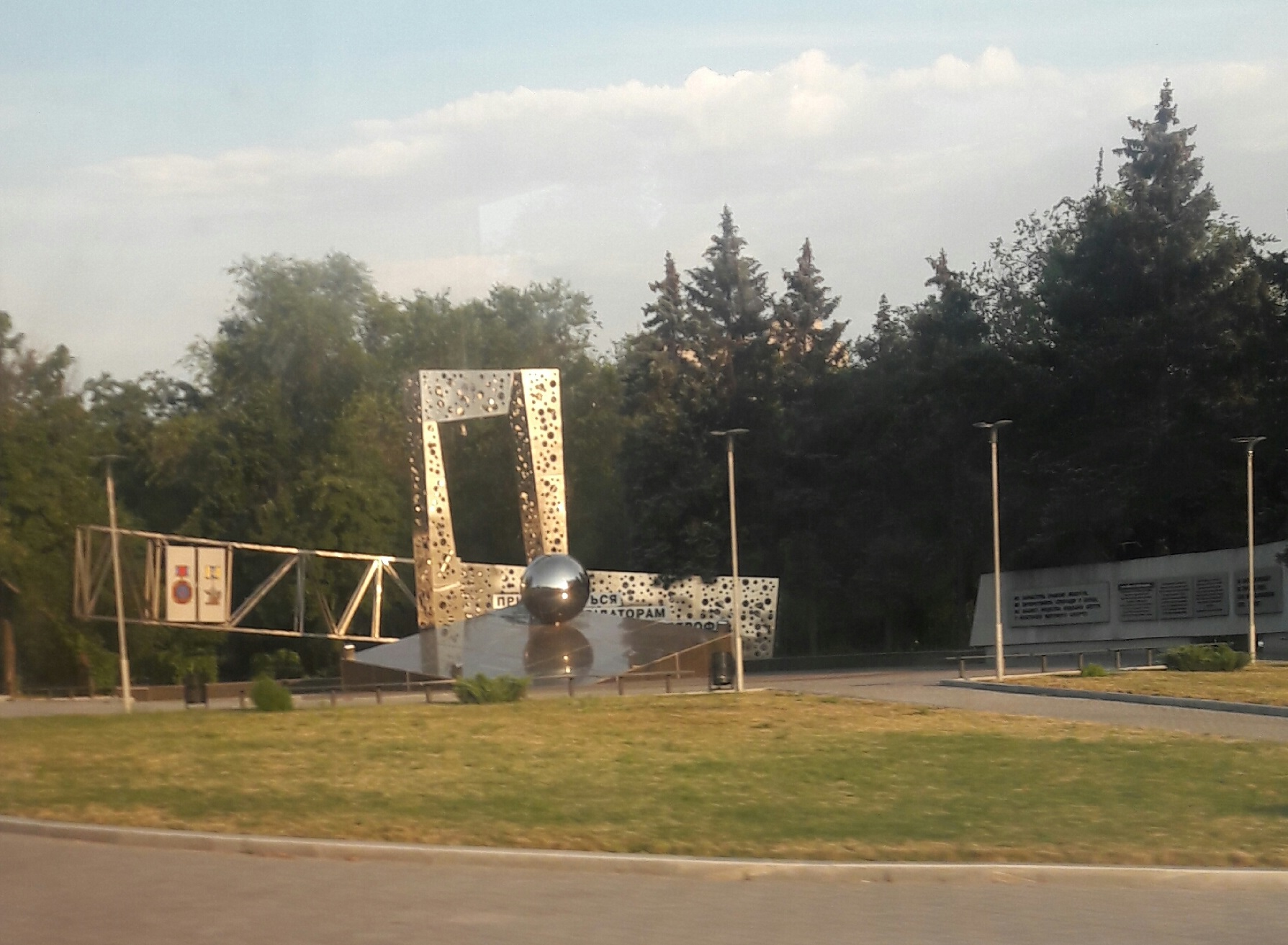 Запоріжжя. Вознесенівський узвіз. Пам'ятник учасникам ліквідації наслідків аварії на Чорнобильській АЕС відкритий 26 квітня 2018 року.